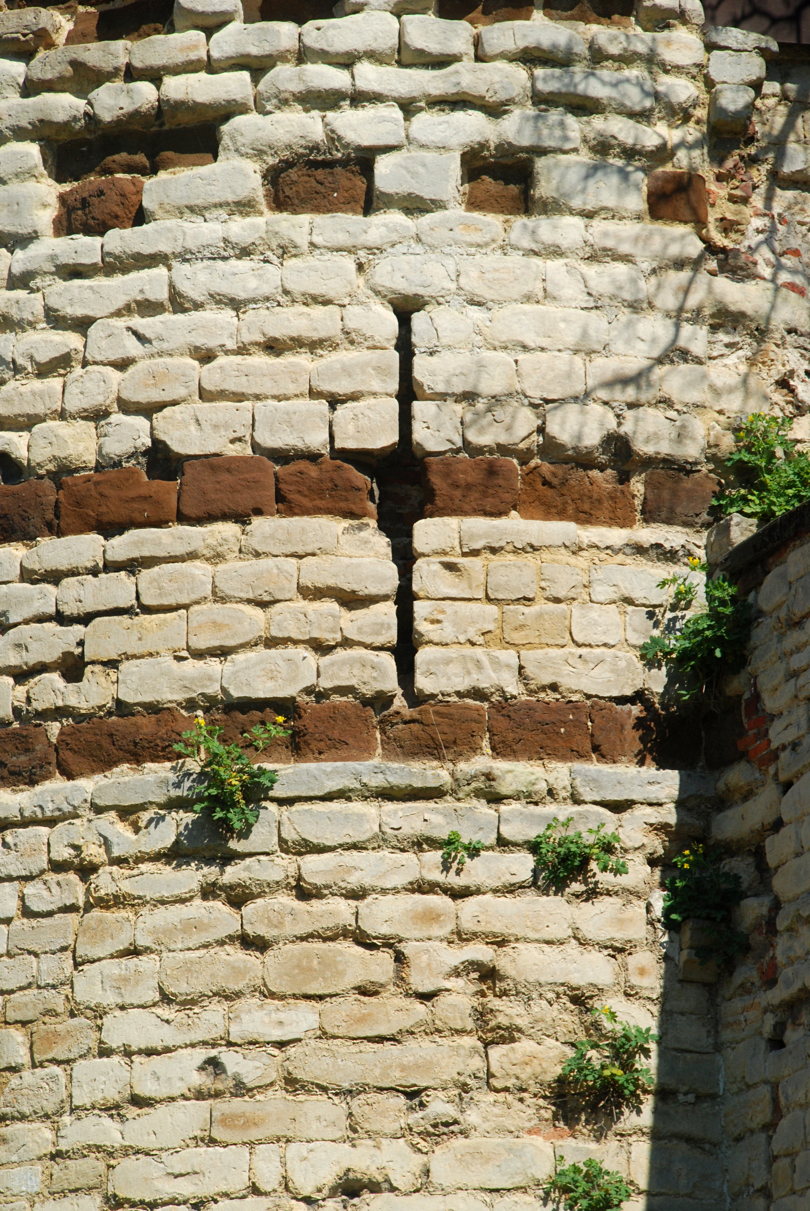 Belgique - Brabant flamand - Première enceinte de Louvain - Handbooghof